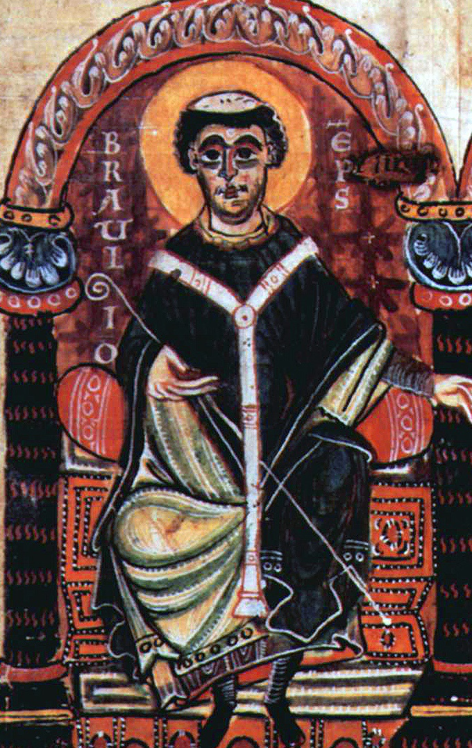 Brauli de Saragossa. Aragonés: Sant Braulio. Arpetan: Braule de Sarâgousse.